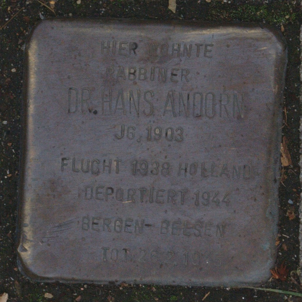 Stolperstein in Hattingen Rabbiner Dr. Hans Andorn